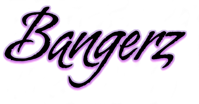 Logotipo del cuarto álbum de estudio de la cantante y compositora estadounidense Miley Cyrus.